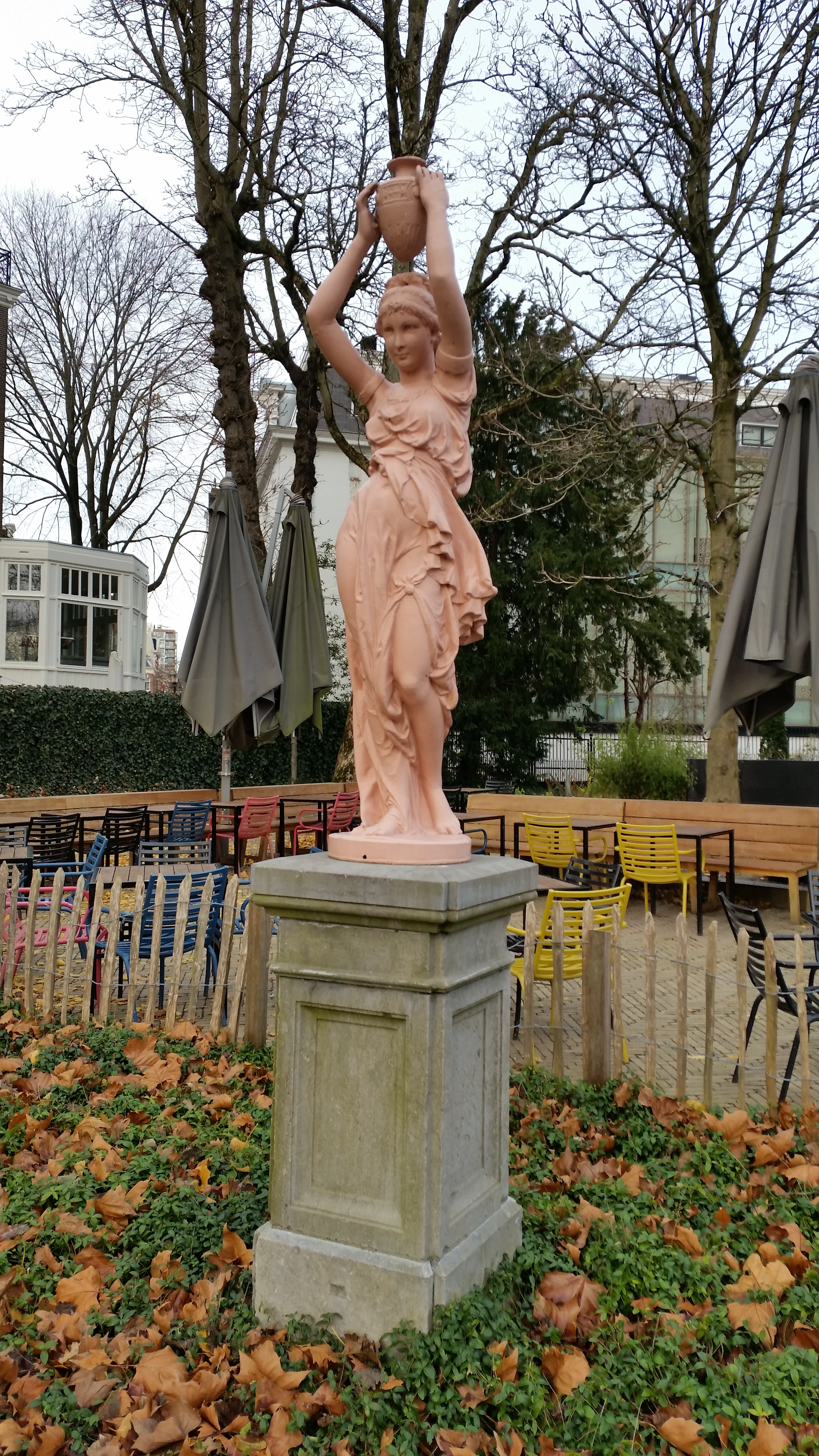 Griekse vrouwen met kruik, vrouw linksvoor het paviljoen